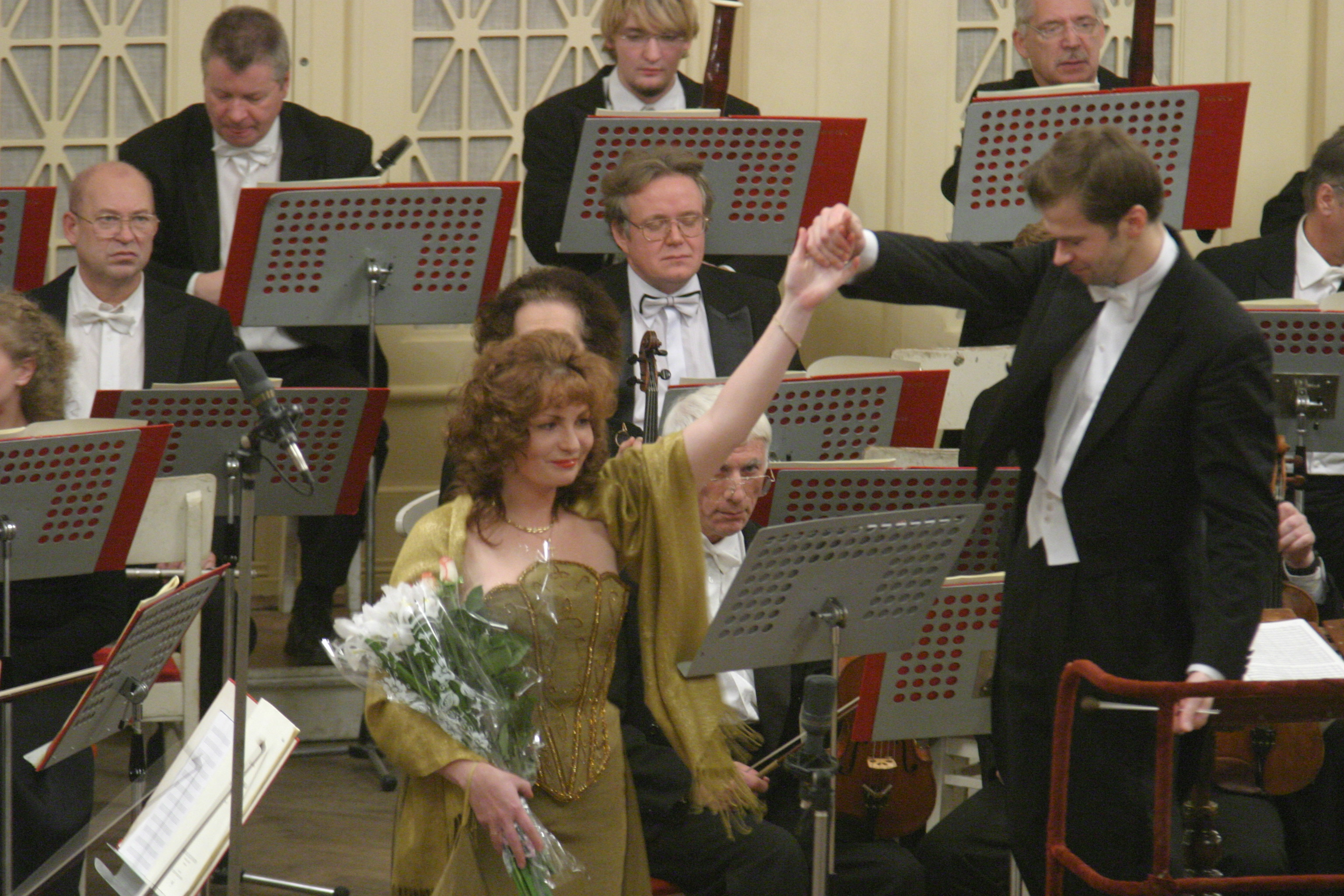 Исполнение Мессии Г.Ф.Генделя